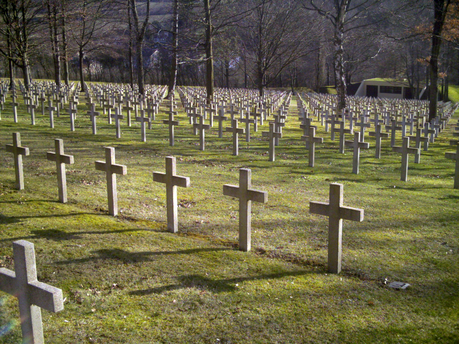 Cimetière militaire du Pétant (commune de Montauville 54)